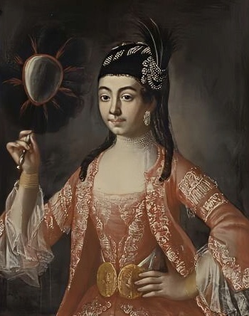 Konstnärinnan och etsaren Elisabeth Palm, gift Schön.